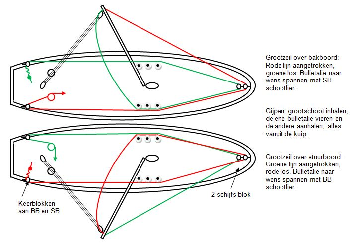 Bulletalie met 2 lijnen altijd beschikbaar